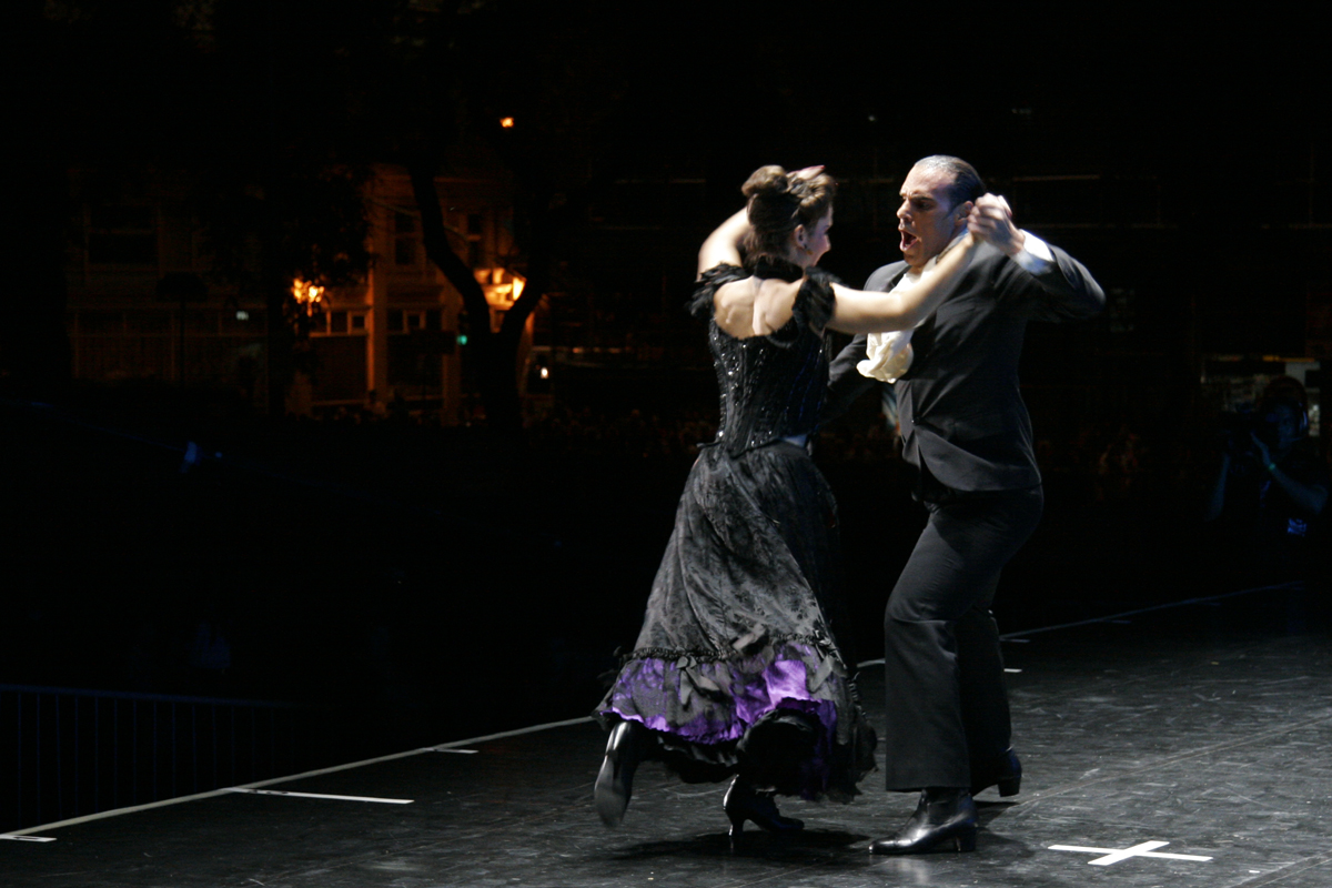 A lo largo del tiempo sus elencos estuvieron integrados por grandes nombres como Juan Carlos Copes y María Nieves, Mayoral y Elsa María, Virulazo, Gloria y Eduardo, Nélida y Nelson, Miguel Angel Zotto y Milena Plebs, Roberto Goyeneche, Horacio Salgan - Ubaldo De Lío, Osvaldo Berlingieri, Raúl Lavié, Susana Rinaldi, el Sexteto Mayor, Jovita Luna, Elba Berón y Alba Solís, entre tantos otros(Foto: Estrella Herrera)